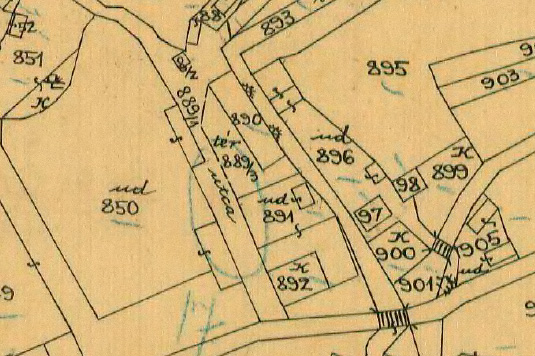 Кузня Гамора на кадастровій карті 1910 року